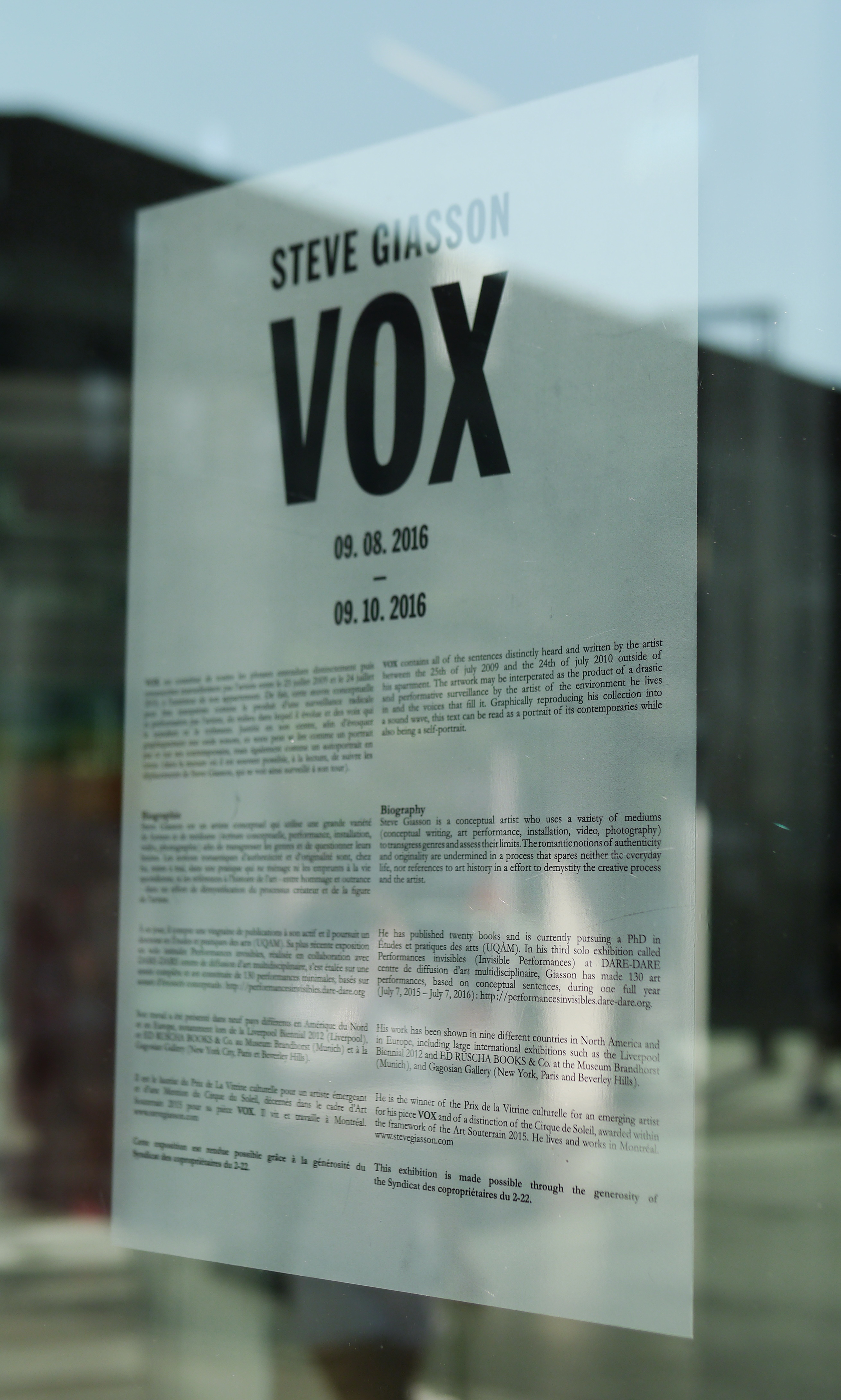 Steve Giasson, VOX, 2016 Installation de l'artiste Steve Giasson, visible du 9 août au 9 octobre 2016, sur les vitres du 2-22, Montréal. VOX est constitué de toutes les phrases entendues distinctement puis retranscrites manuellement par l'artiste Steve Giasson, entre le 25 juillet 2009 et le 24 juillet 2010, à l'extérieur de son appartement. De fait, cette oeuvre conceptuelle peut être interprétée comme le produit d'une surveillance radicale et performative par l'artiste, du milieu dans lequel il évolue et des voix qui le scandent et le rythment. Justifié en son centre, afin d'évoquer graphiquement une onde sonore, ce texte peut se lire comme un portrait par et sur ses contemporains, mais également comme un autoportrait en creux (dans la mesure où il est souvent possible, à la lecture, de suivre les déplacements de Steve Giasson, qui se voit ainsi surveillé à son tour).